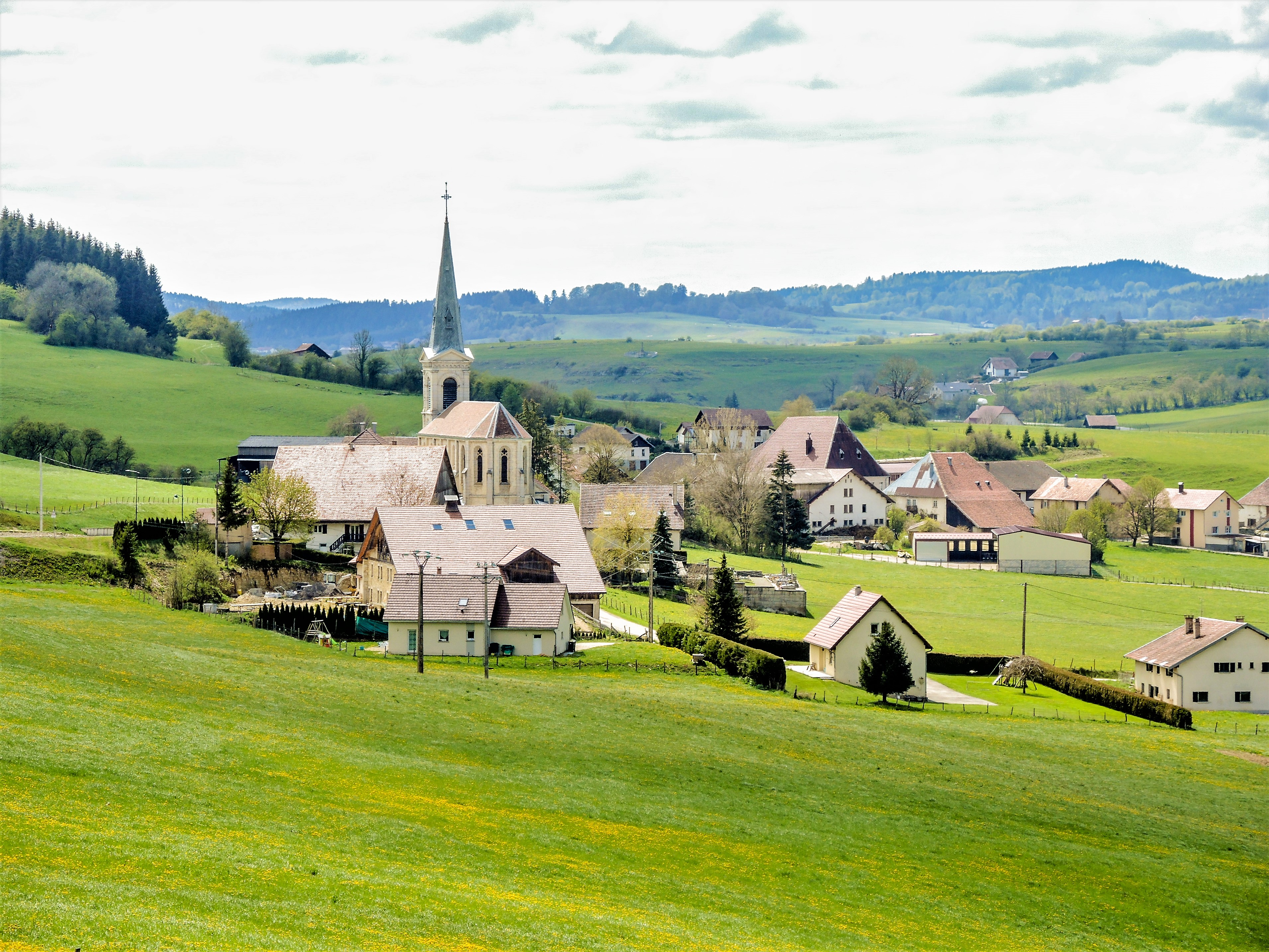 Centre du village